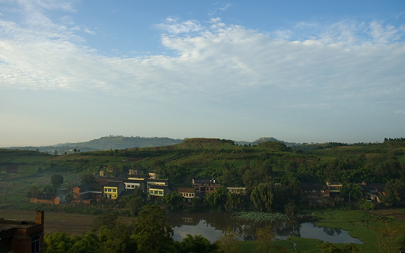 伍隍镇